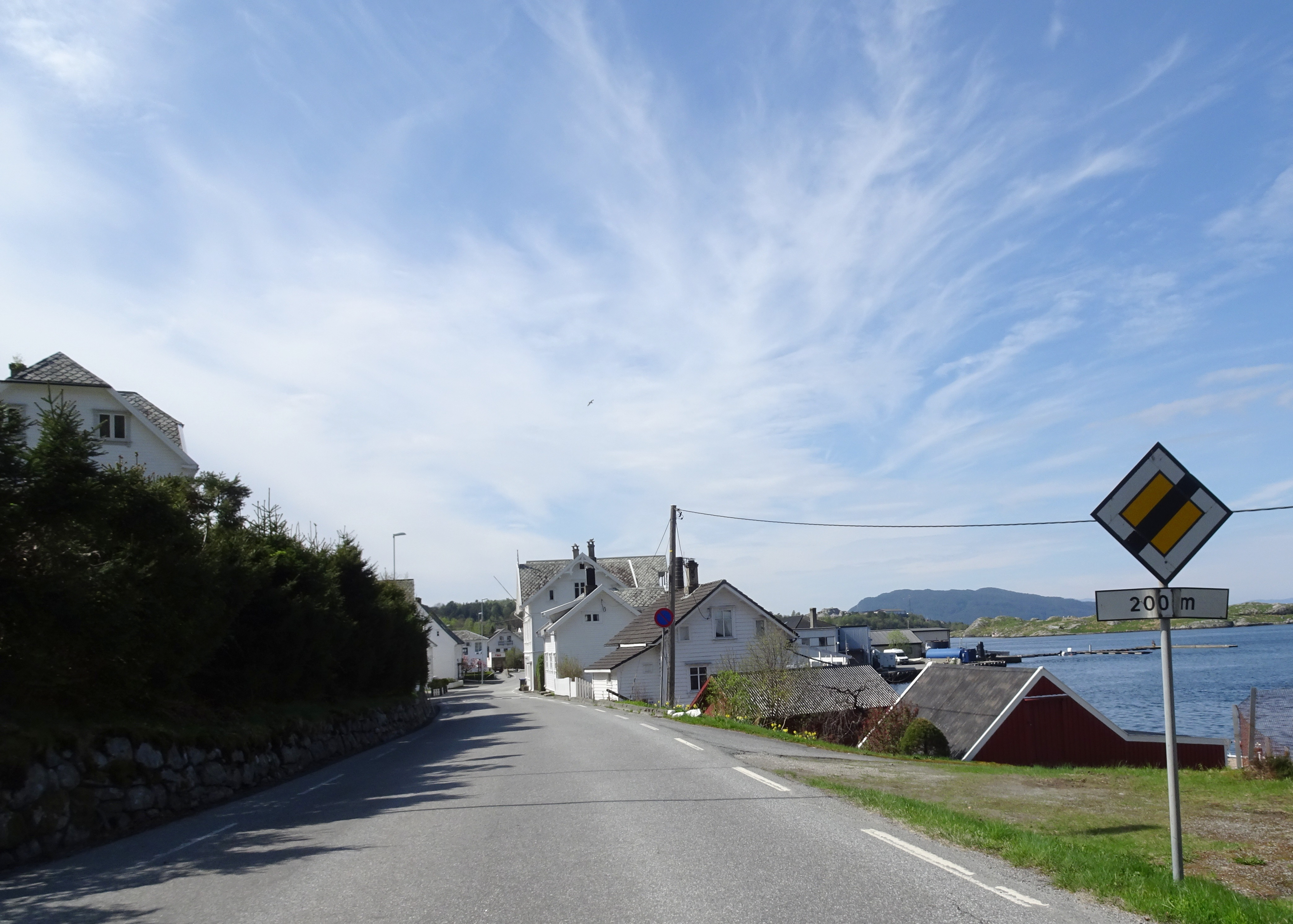 Fylkesvei 548 (tidl. 48) i Skånevik